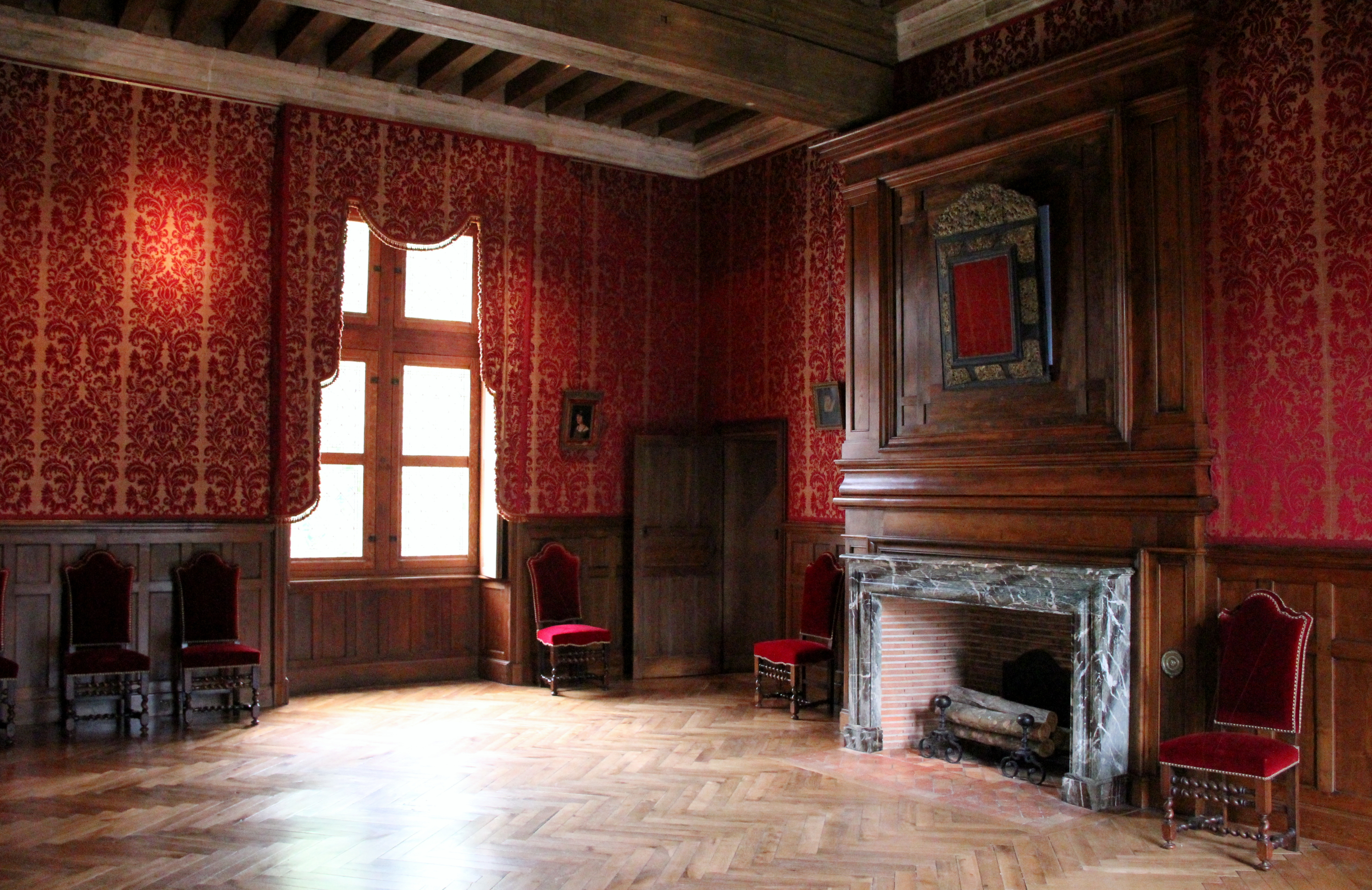 salle intérieure .